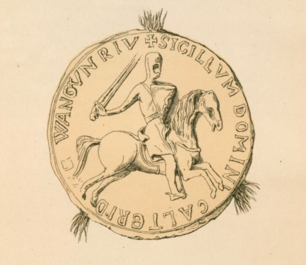 Sceau de Gautier Ier de Vignory, par Jules d'Arbaumont dans le Cartulaire du Prieuré de Saint-Etienne de Vignory (1882).